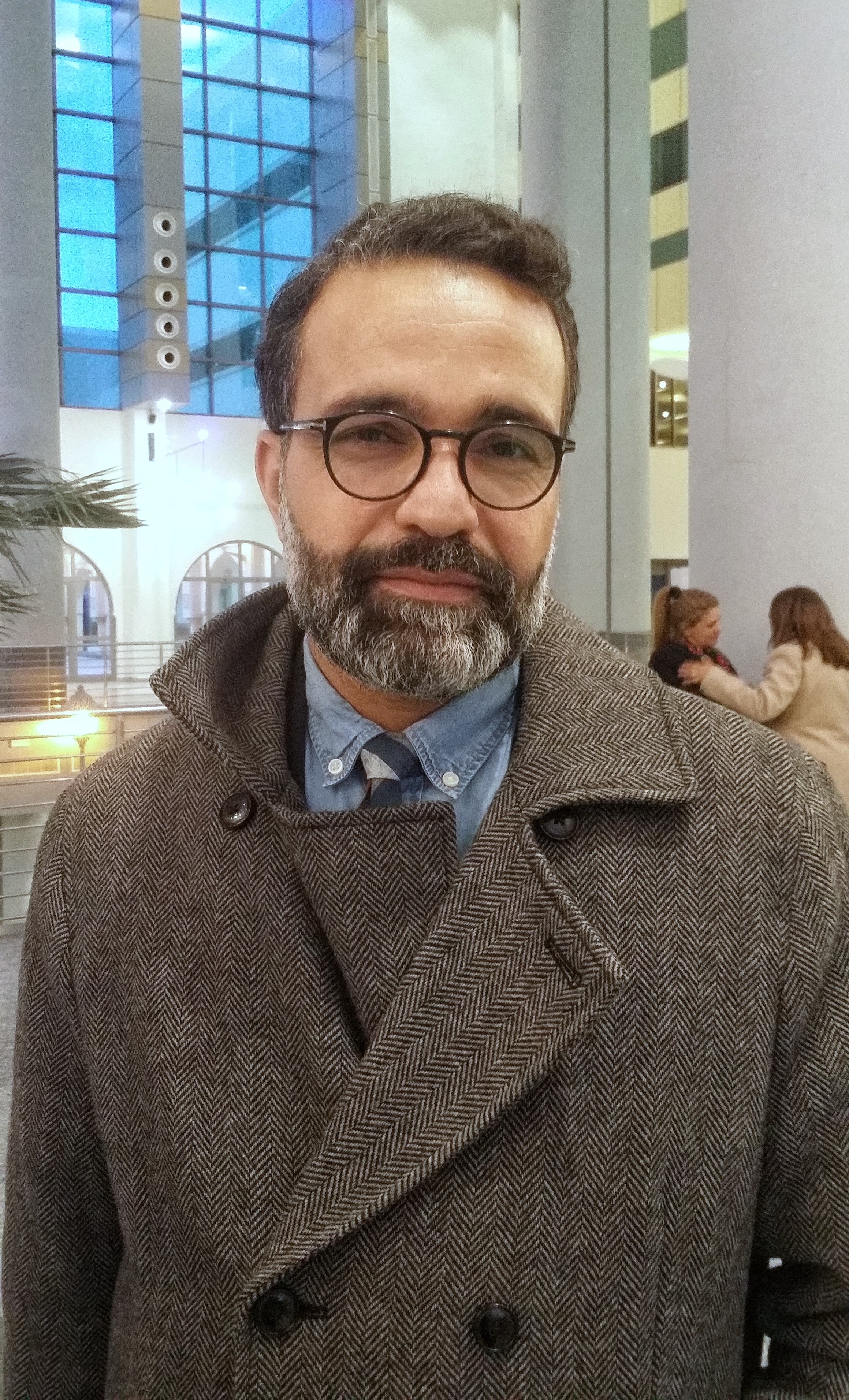 Kamel Riahi is a Tunisian writer